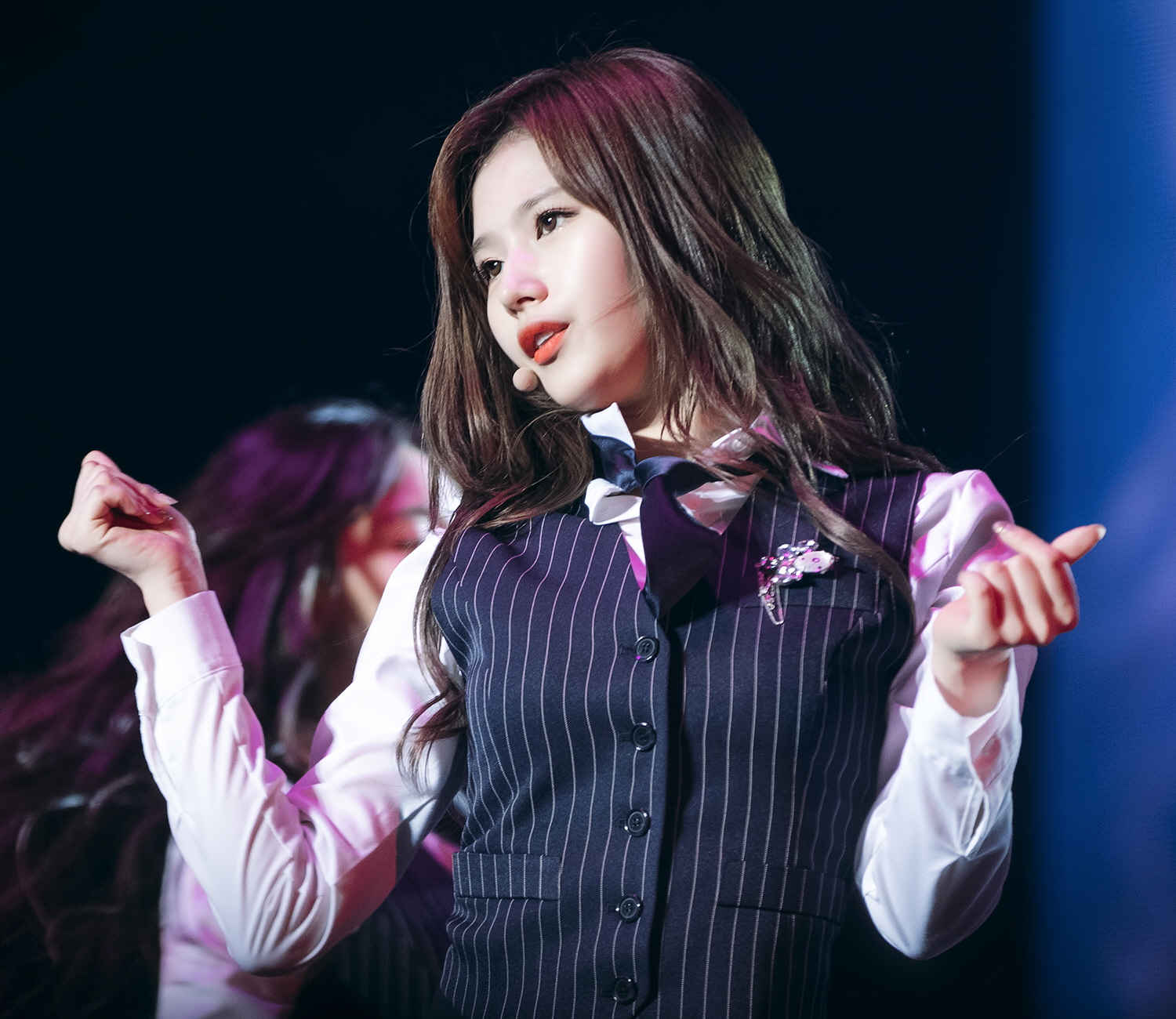 180519 트와이스랜드 마지막 날